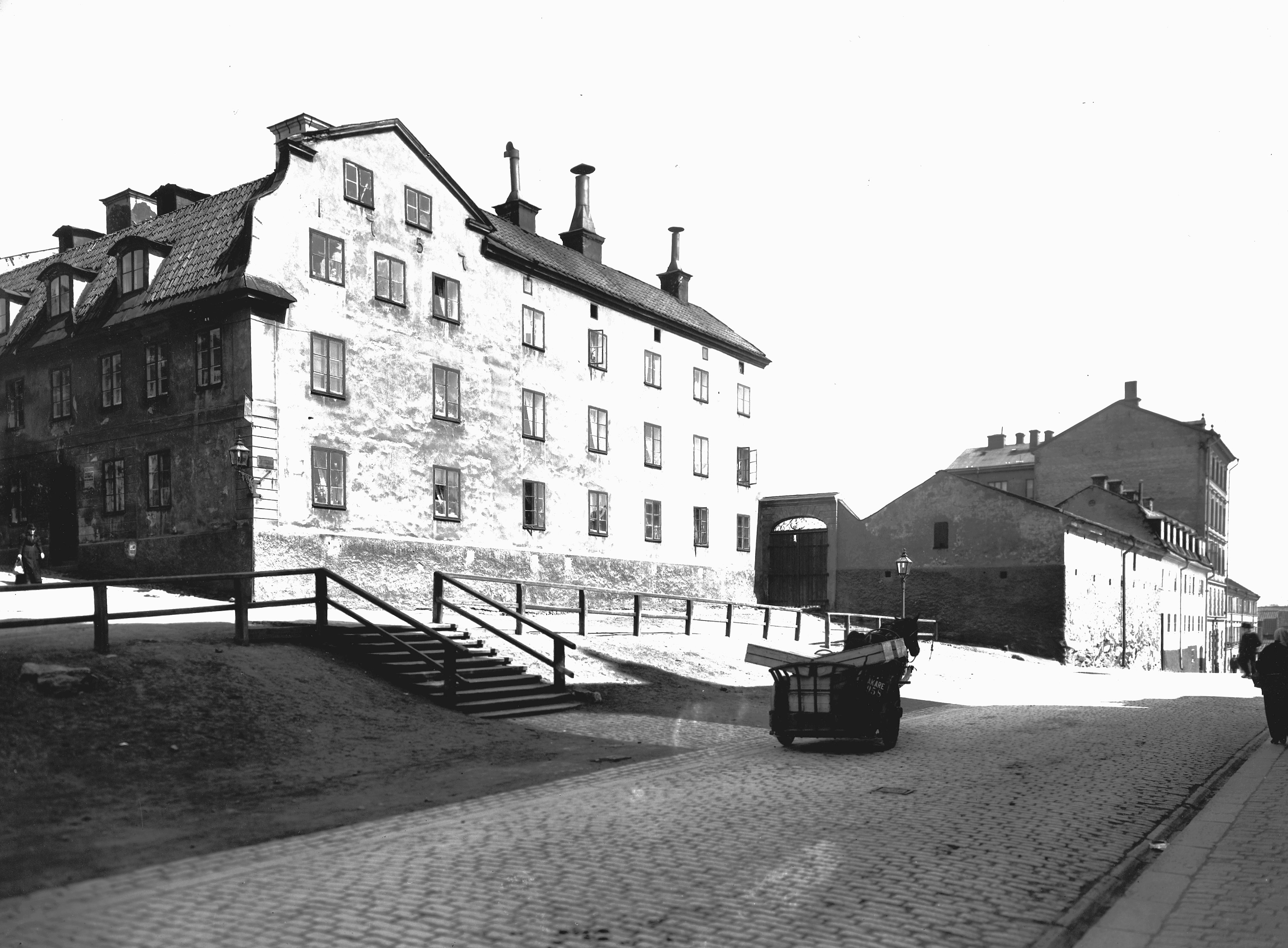 Fastigheten Drottningen 5, Katarina kyrkobacke 7 / Högbergsgatan 16